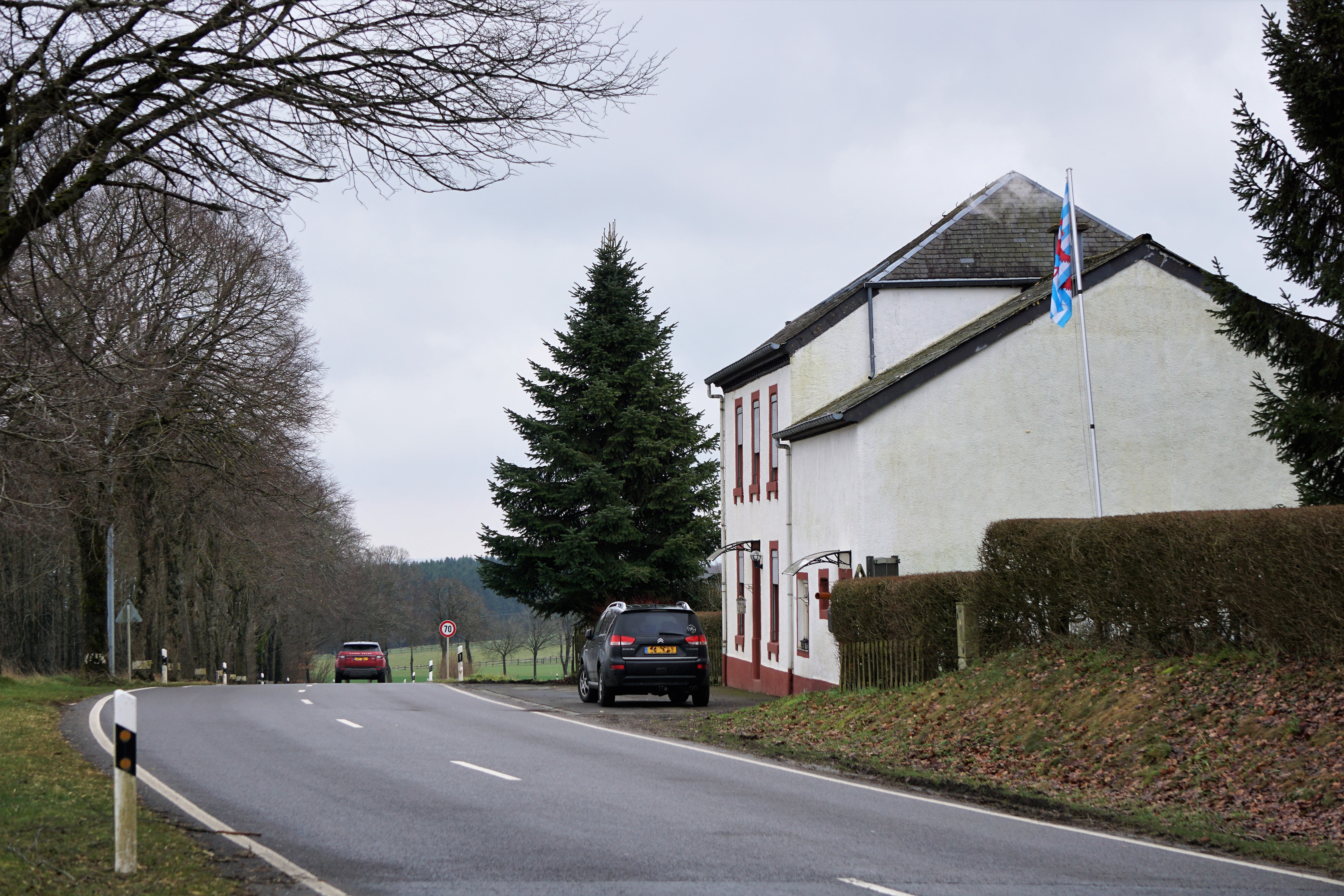 Grosbous, lieu-dit Léierhaff (Lehrhof).